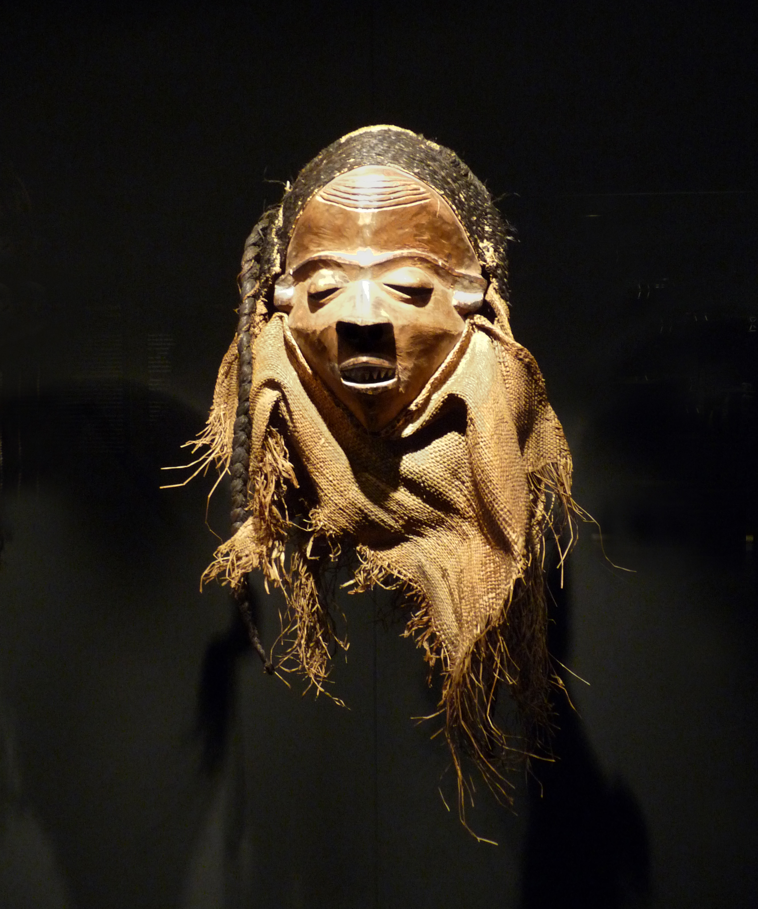 Masque nganga ngombo. Bois, raphia tissé, fibres végétales. 28 cm. 20e siècle. République démocratique du Congo, Pende. (Musée ethnologique de Berlin)